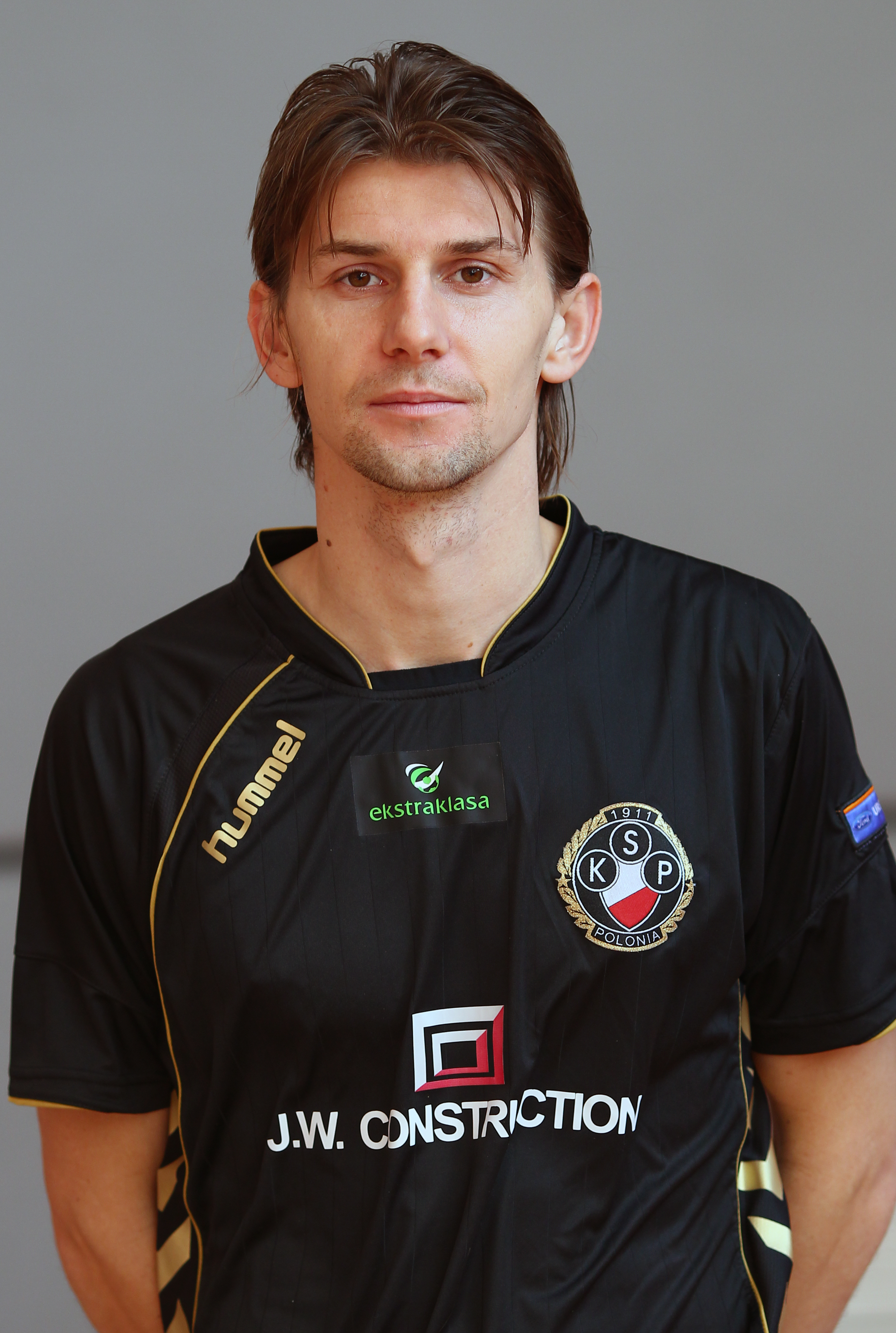 Euzebiusz Smolarek, player of Polonia Warszawa (2011)